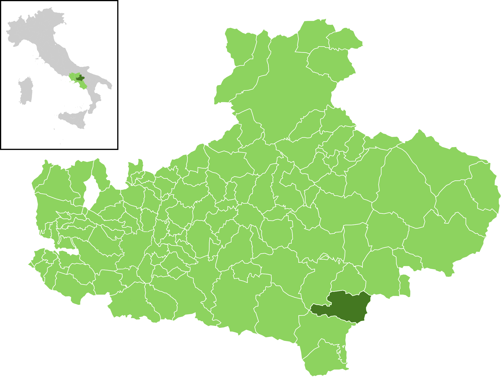 Il comune all'interno della provincia di Avellino